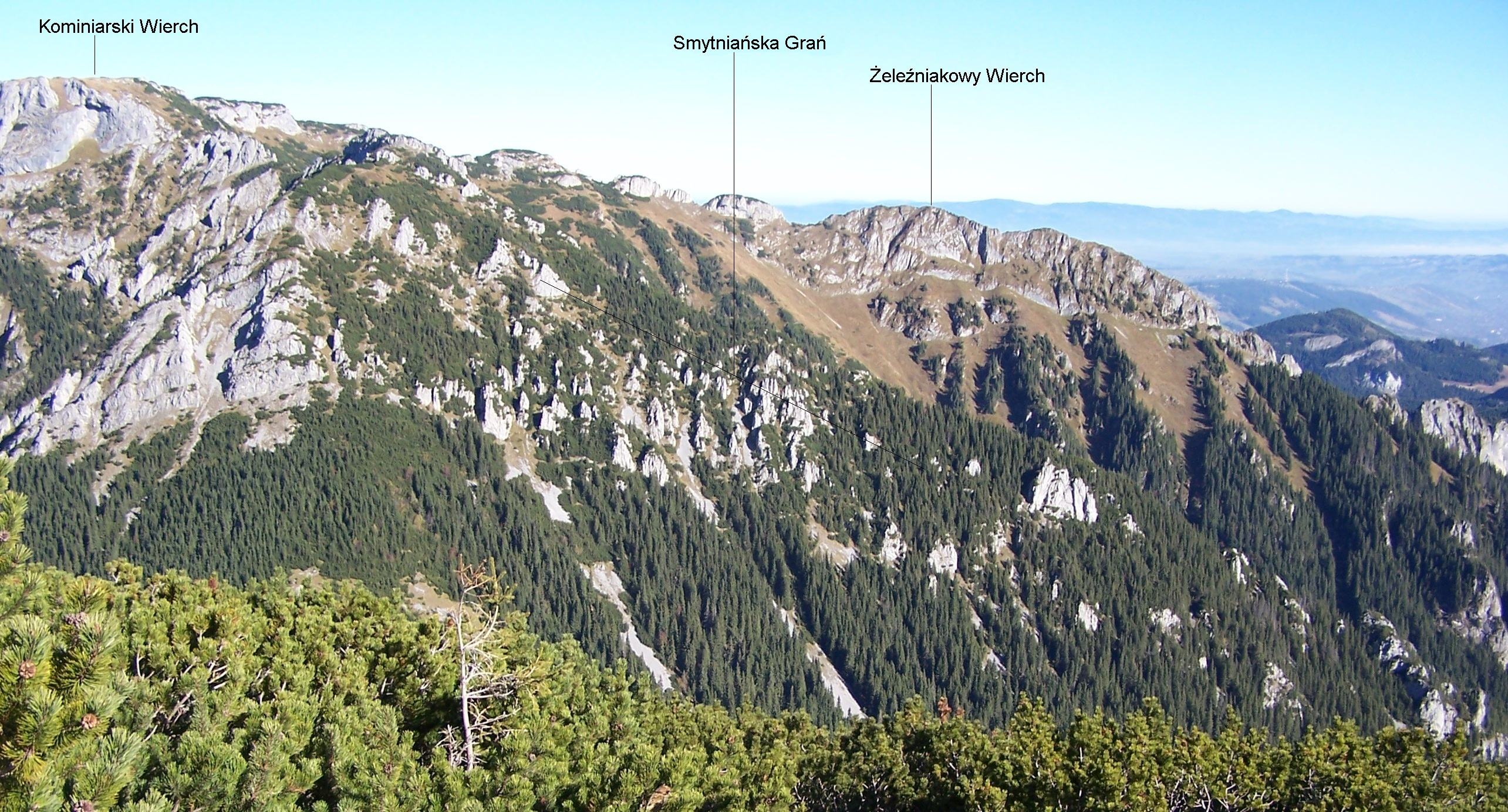 Widok z Ornaku na Kominiarski Wierch